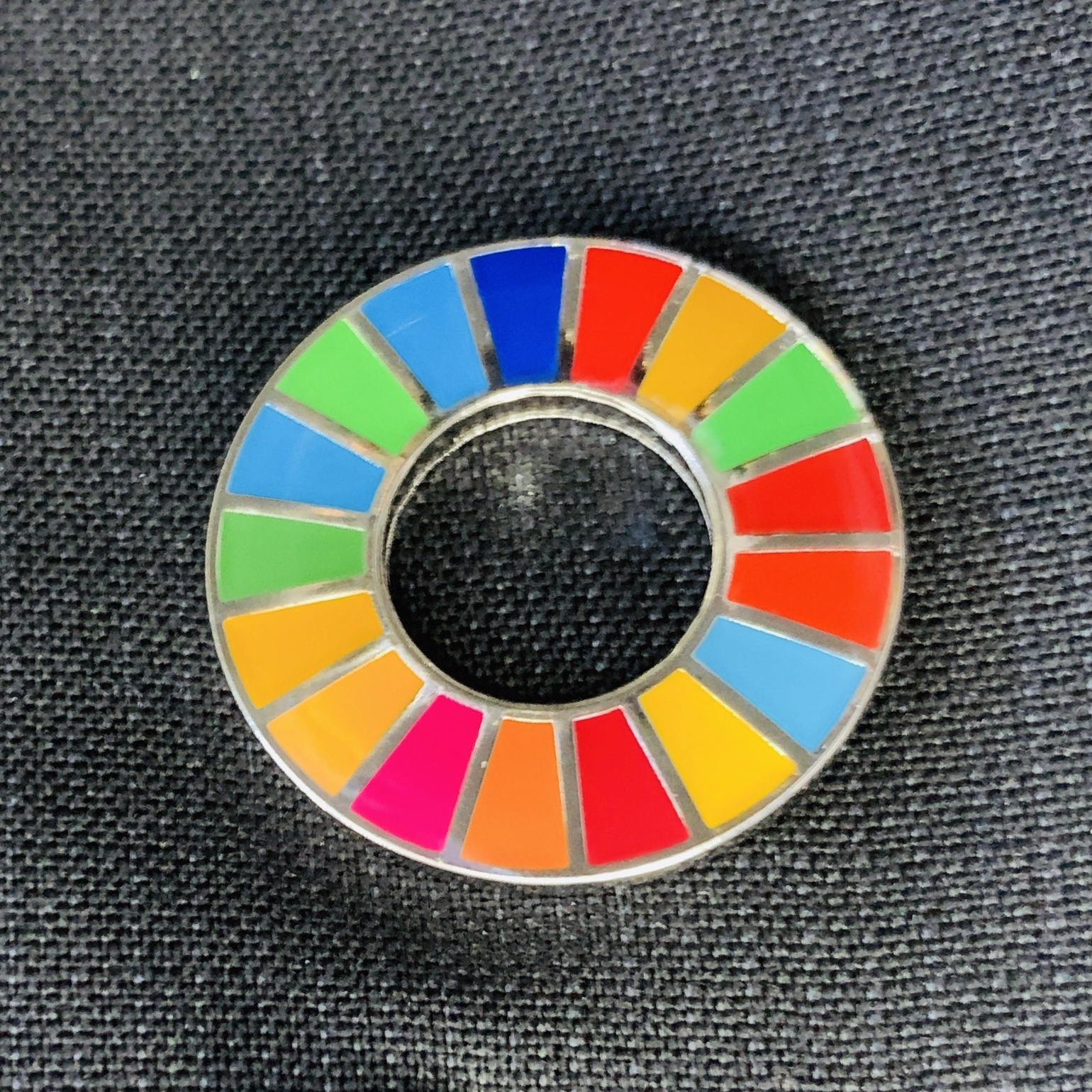 SDGs ピン バッチ